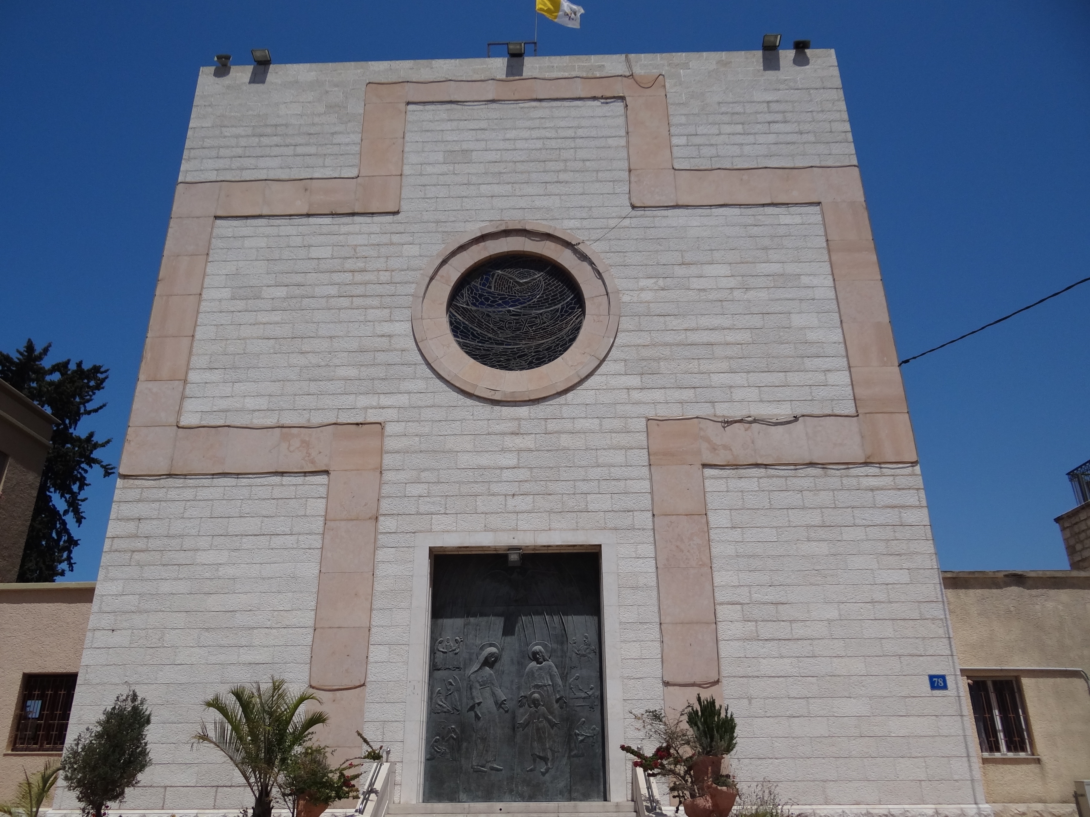 Saint Joseph's Latin Parish, Haifa Israel סיינט גוזף, הכנסייה הלטינית, שוכנת בחיפה בשדרות המגינים. מבני הקהילה כוללים ברת בית הספר כרמל בשדרות המגינים 76, מבנה הכנסייה בשדרות המגינים 78, ומבנה הקהילה בשדרות המגינים 80 מבנה הכנסייה